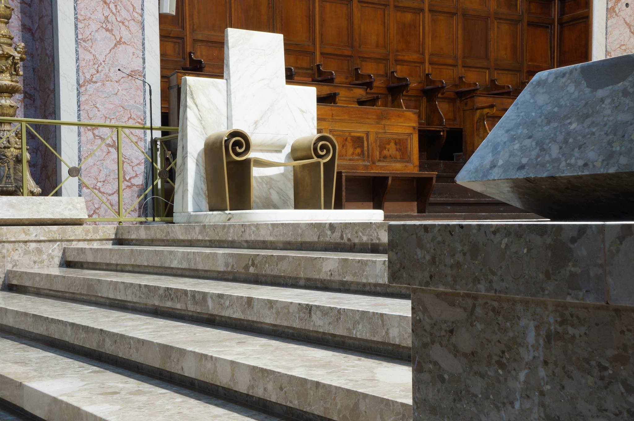 Cattedra